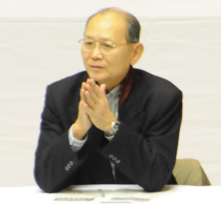 加藤廣志 能代工業元監督。秋田県立体育館で。